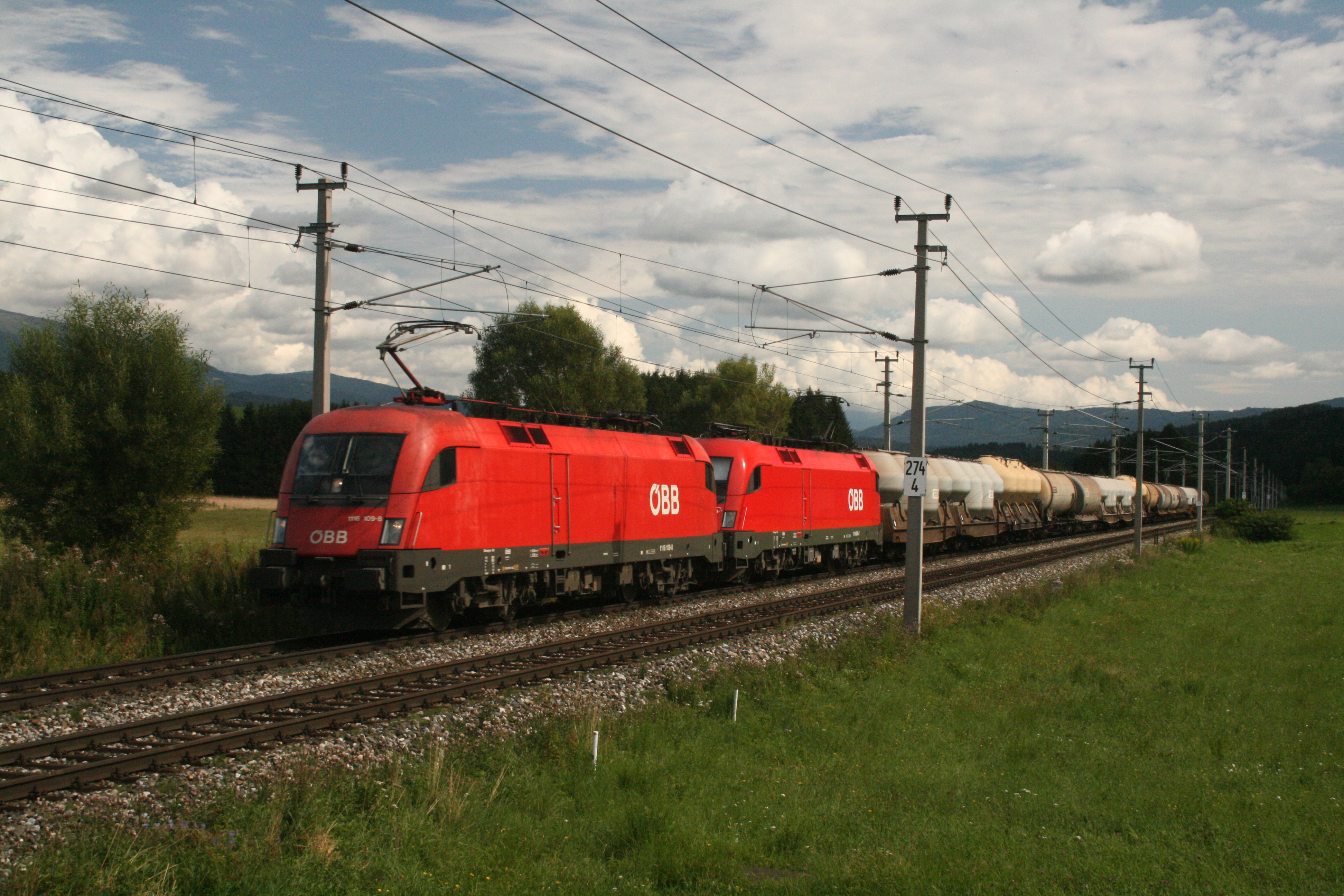 Güterzug mit zwei ÖBB 1116 "Taurus", knapp vor dem Bahnhof Mariahof-St.Lambrecht, von Süden kommend